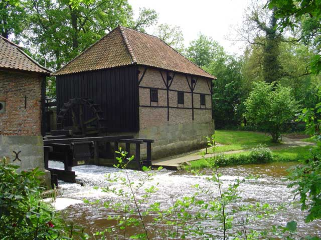 Oostendorper watermolen bij Haaksbergen. Foto Xaphire